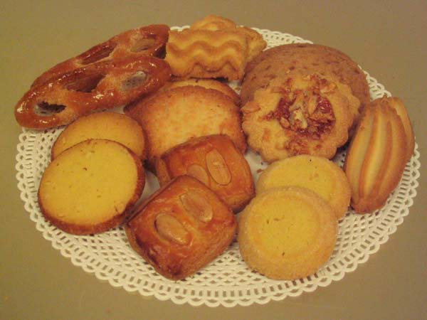 Koekjes